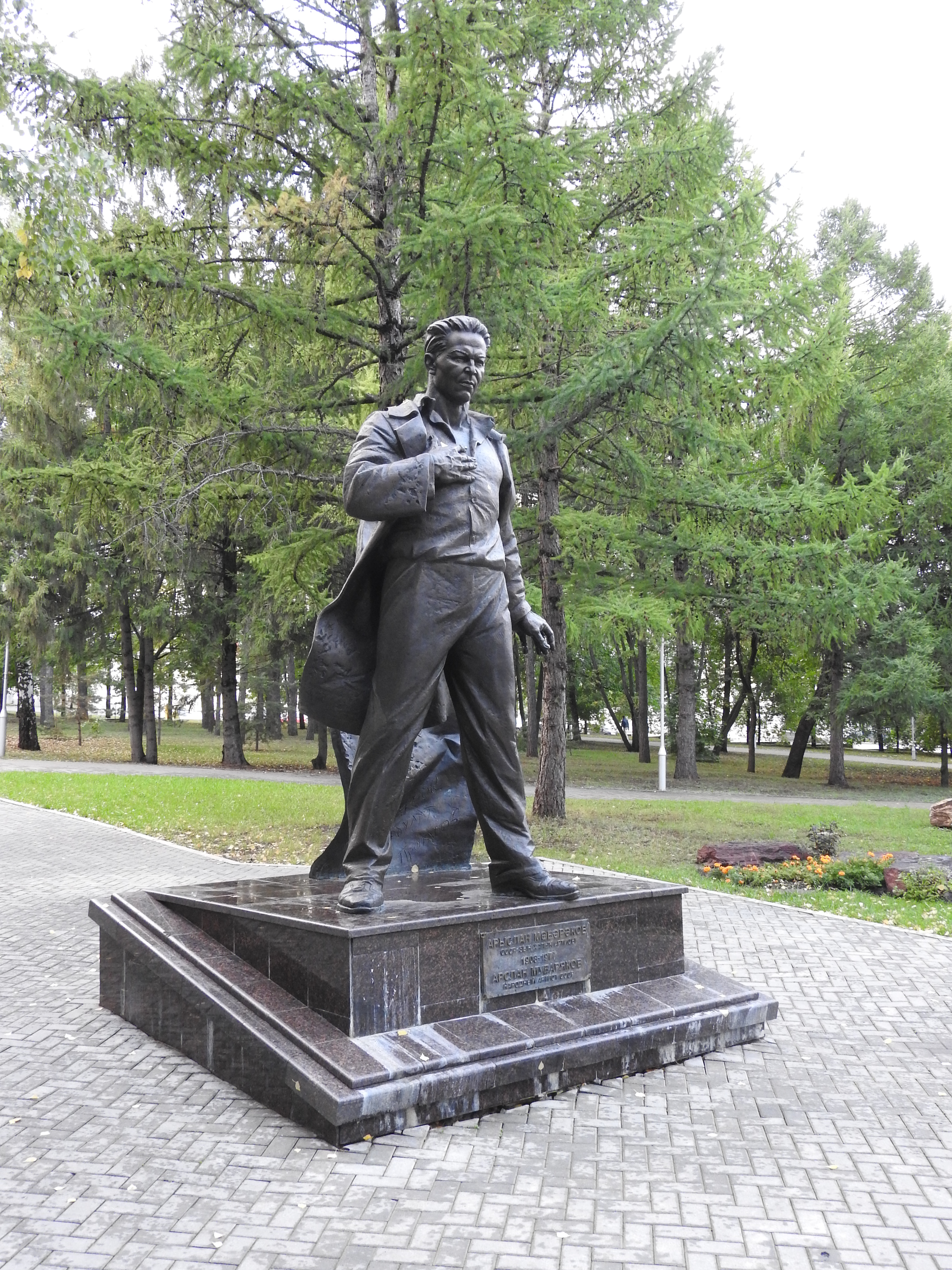 Памятник народному артисту СССР Мубарякову Арслану Котлыахметовичу